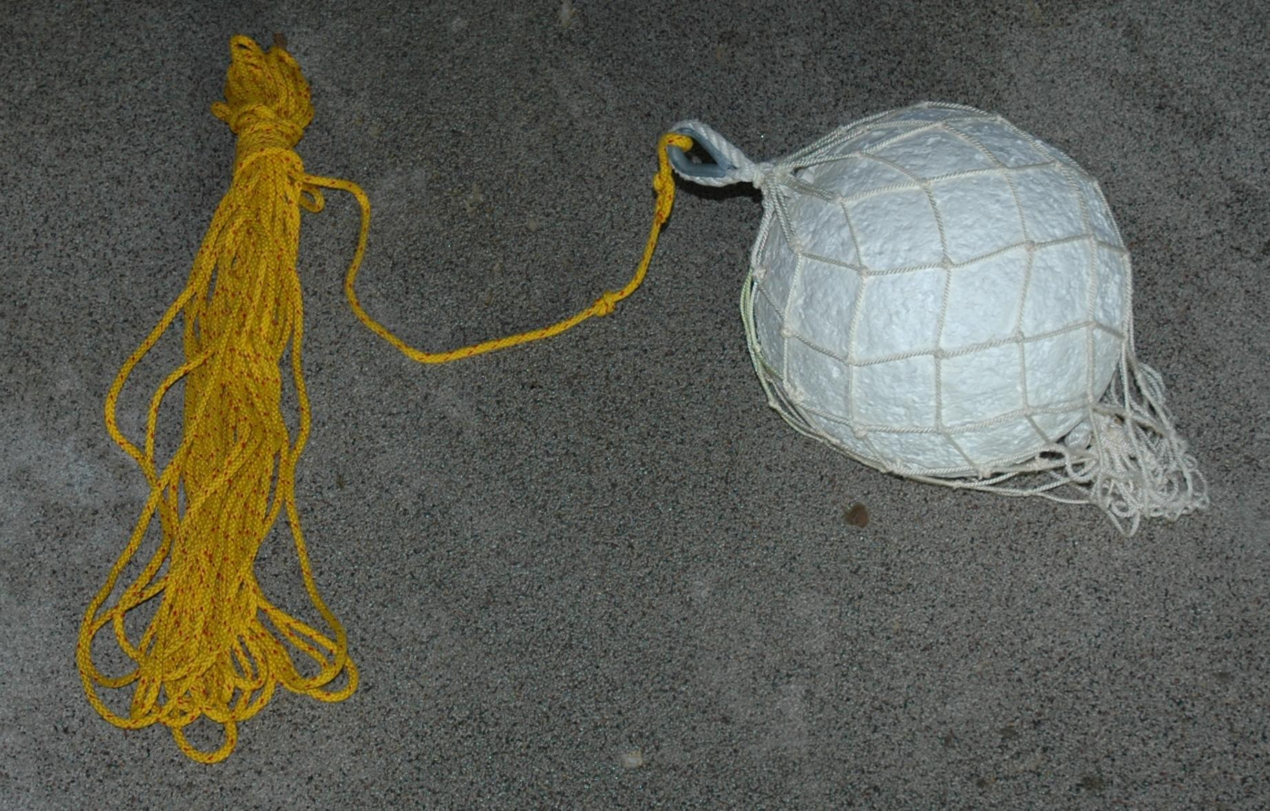 Rettungsball mit Rückholleine